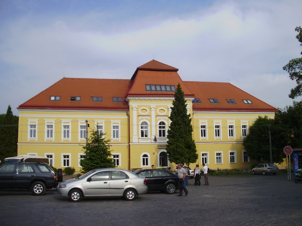 Gymnázium